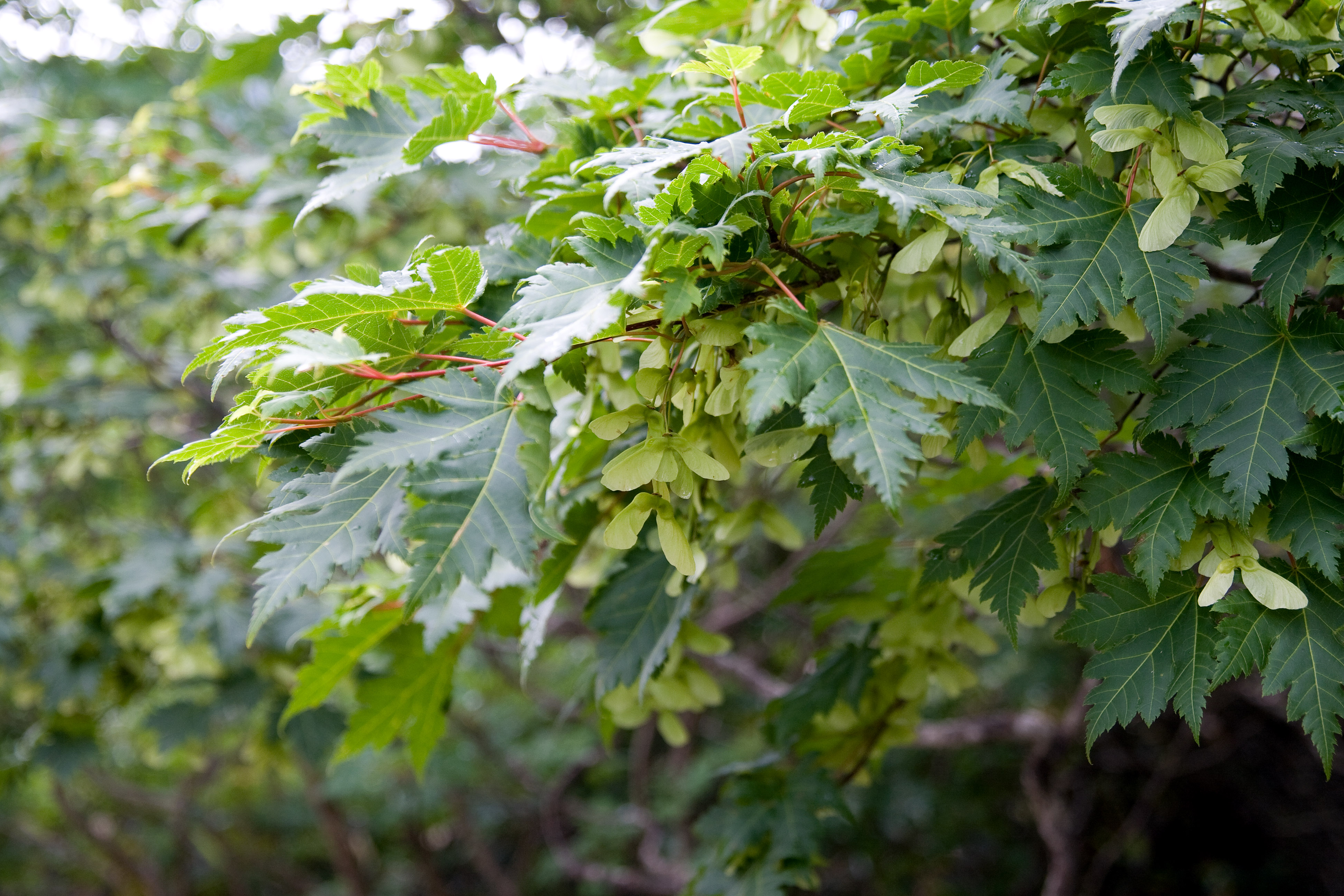 ミネカエデ (学名:Acer tschonoskii)